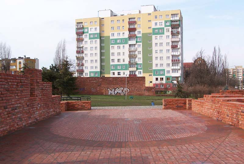 Biblioteka Świętego Pielgrzyma w Głogowie - pomnik Jana Pawła II i lapidarium kościoła św. Piotra, widok ku zachodowi